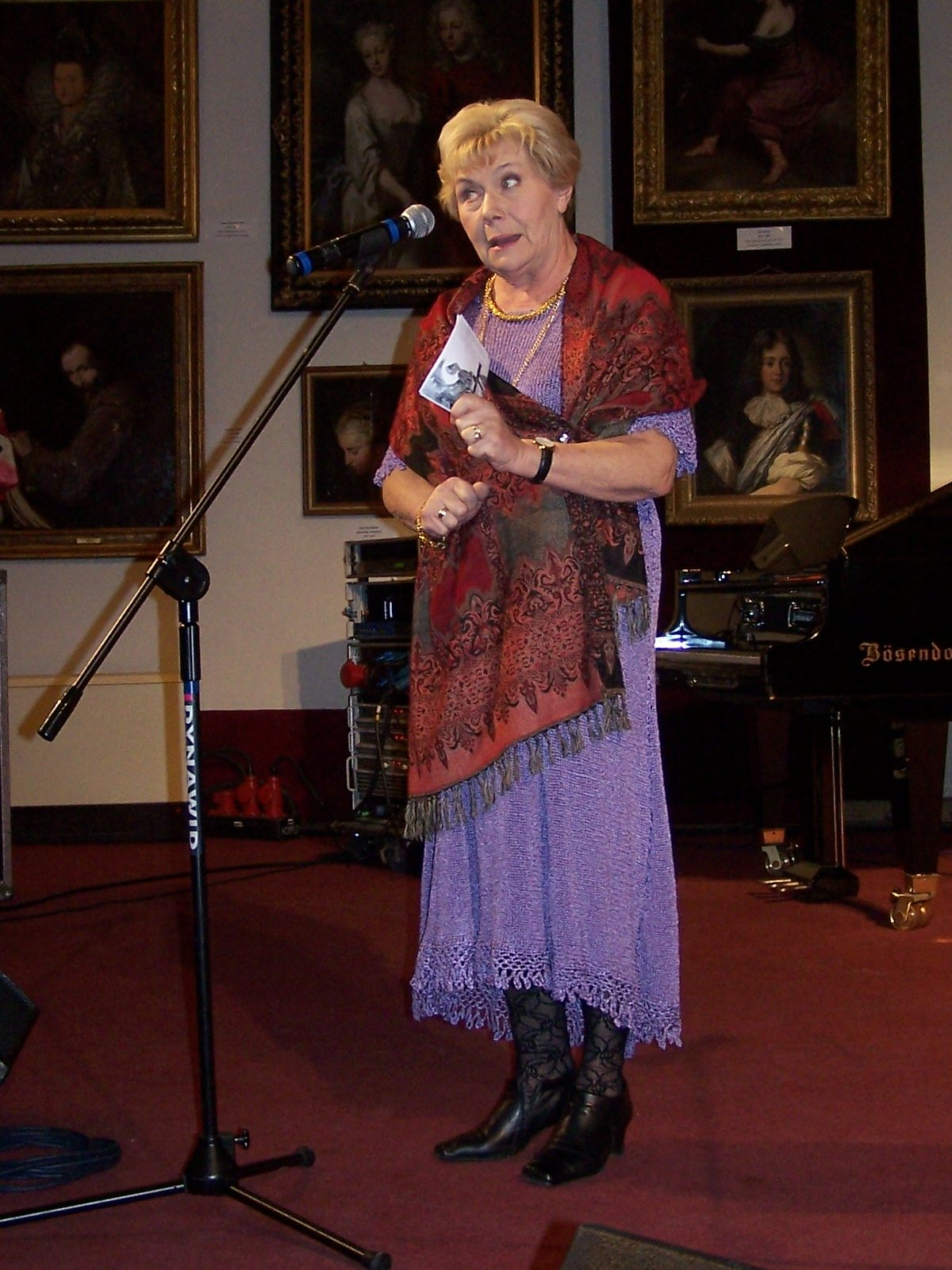 Teresa Lipowska na uroczystości wręczenia nagród w konkursie "Kwiaty dla Babci i Dziadka", Galeria Porczyńskich, Warszawa